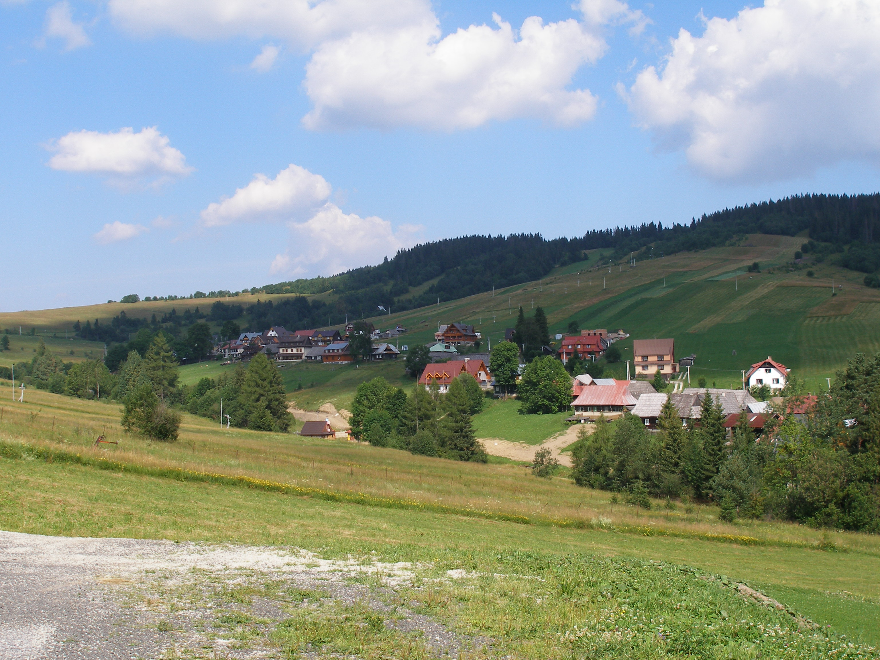 Podtatranská obec Ždiar